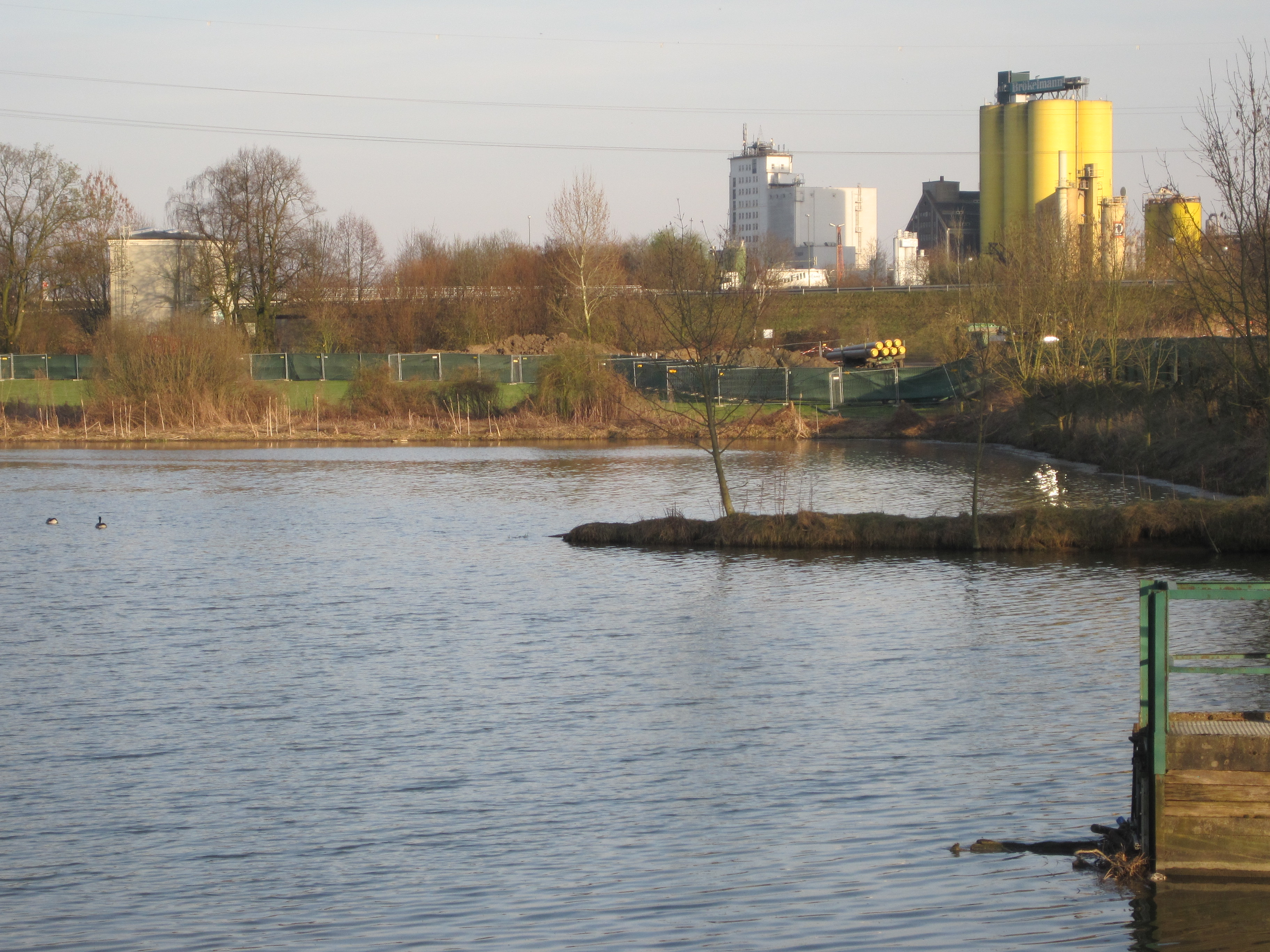 Das Foto zeigt den Radbodsee in Hamm-Bockum-Hövel.